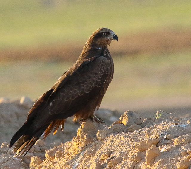 דיה שחורה, צולם בסמוך לאתר דודאים, ישראל